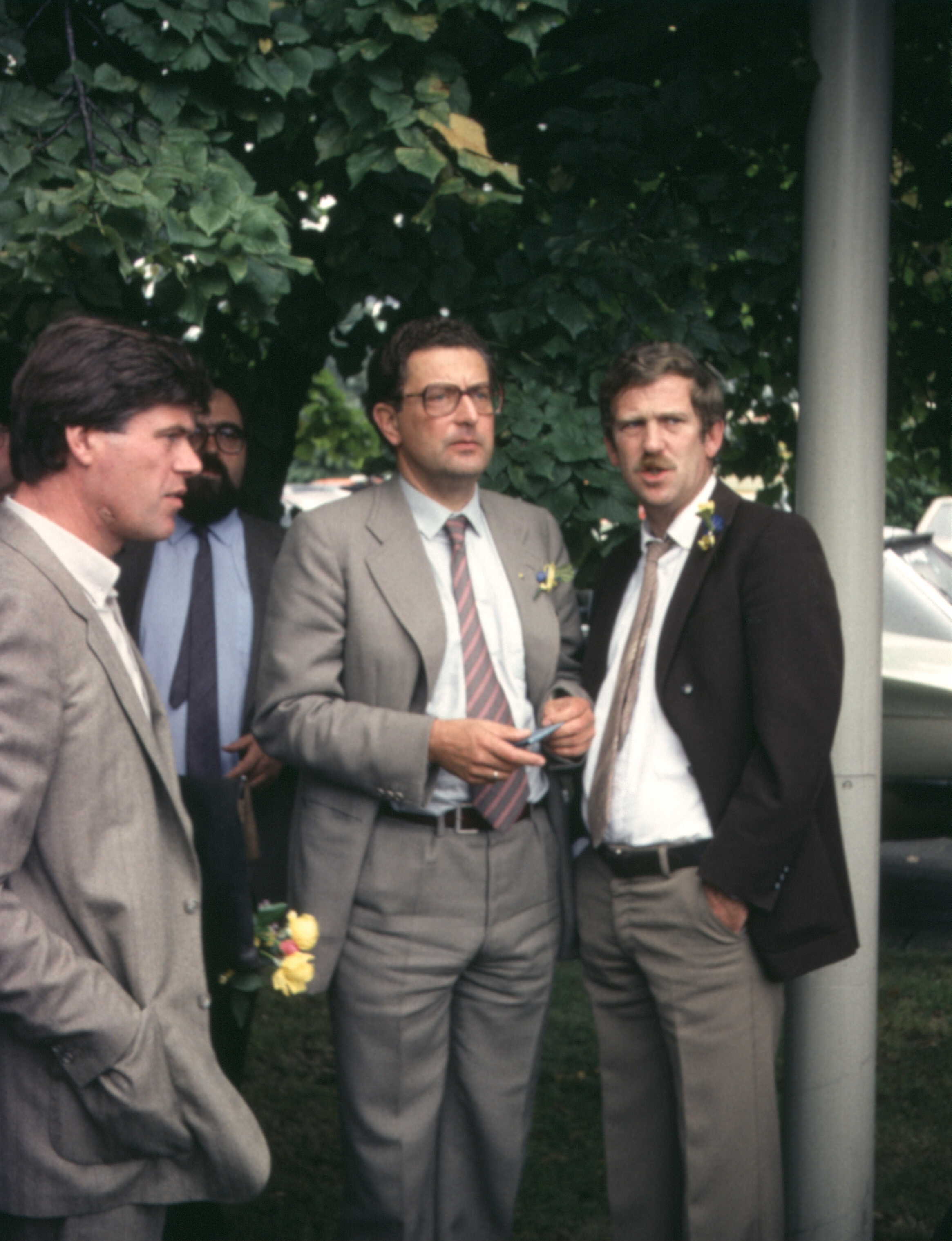 Gerhart Baum am 30. August 1980 auf einer FDP Wahlveranstaltung zur Bundestagswahl 1980